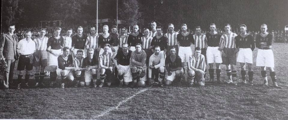 Blågulrandiga Stattena mot AIK på Råsunda i Allsvenskan 1927-08-21